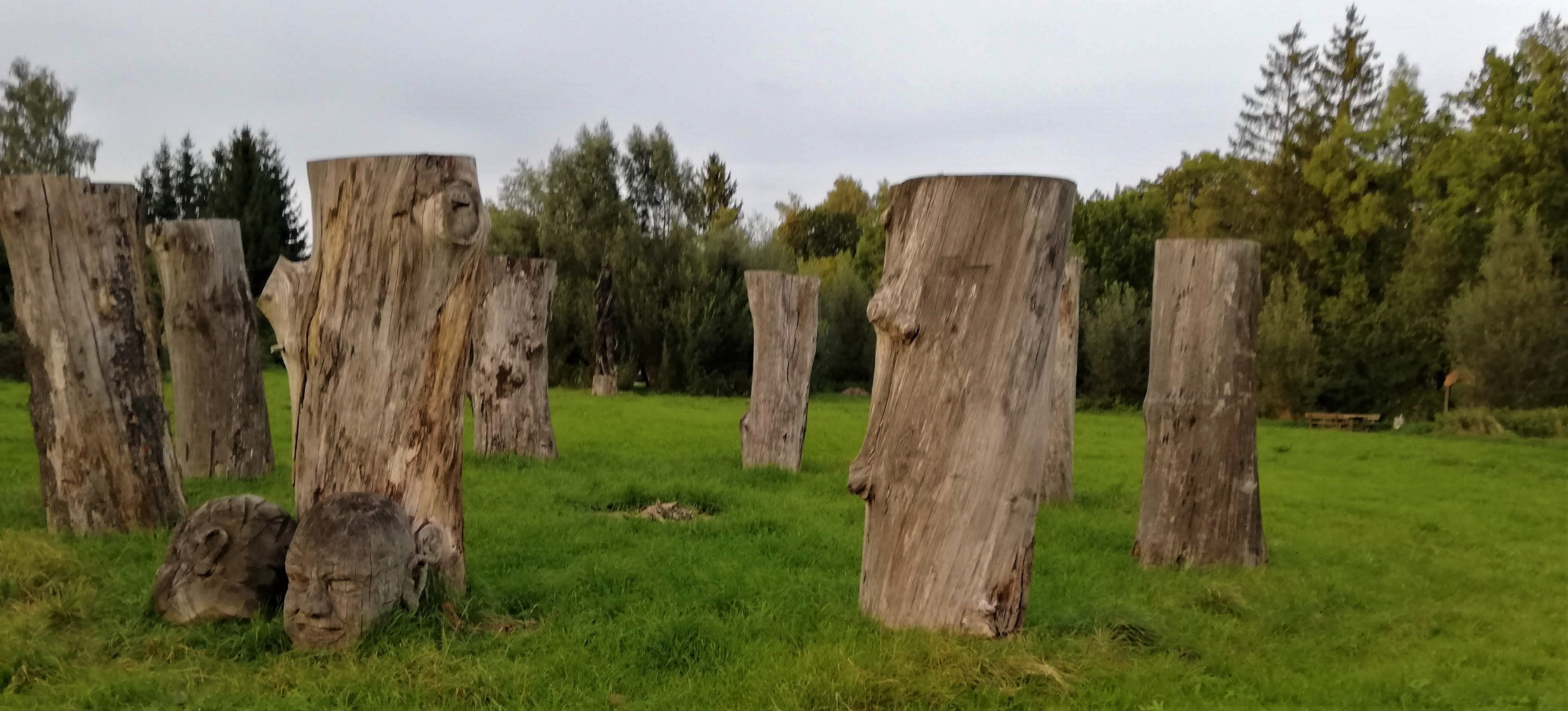 Skulturen- und Weidenhain Taufkirchen